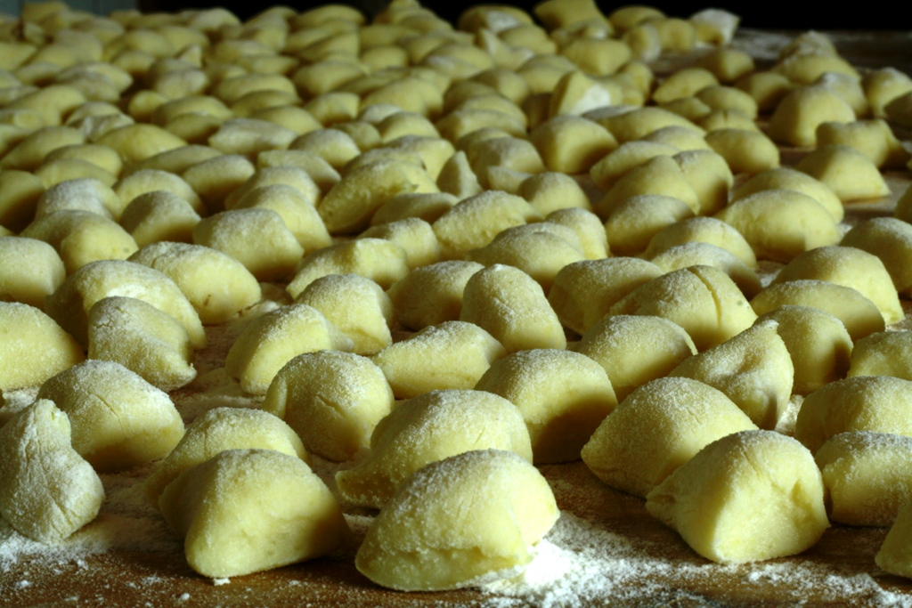 Gnocchi caserecci.